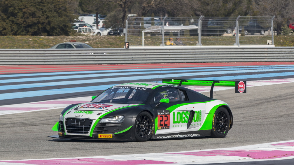 L'Audi R8 du Team Parker Racing durant les Blancpain Test Days 2015 au circuit du Castellet